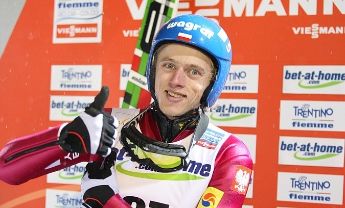 Dawid Kubacki podczas serii kwalifikacyjnej do konkursu Mistrzostw Świata 2013 na skoczni normalnej